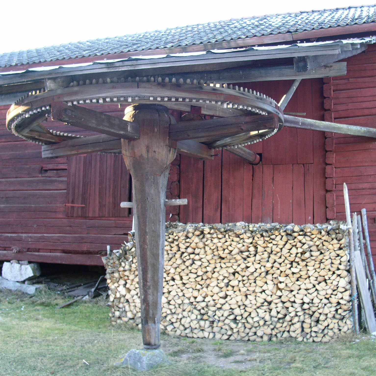 Tröskvandring, Gåsholmen, Björbo